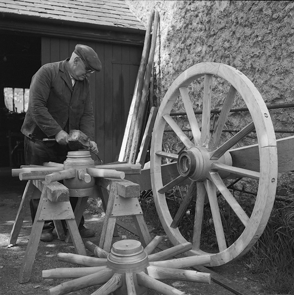 Teitl Cymraeg/Welsh title: Gruffydd Williams, 71 oed, Ty'n Coed, Bodffordd, Ynys Mon - saer troliau wrth ei waith Ffotograffydd/Photographer: Geoff Charles (1909-2002) Dyddiad/Date: June 4, 1964. Cyfrwng/Medium: Negydd ffilm / Film negative Cyfeiriad/Reference: (gch36488) Rhif cofnod / Record no.: 3471977 Rhagor o wybodaeth am gasgliad Geoff Charles yn Llyfrgell Genedlaethol Cymru More information about the Geoff Charles Collection at the National Library of Wales Mae ffotograffau Geoff Charles hefyd yn rhan o Broject Europeana Libraries Geoff Charles' photographs also form part of the Europeana Libraries Project